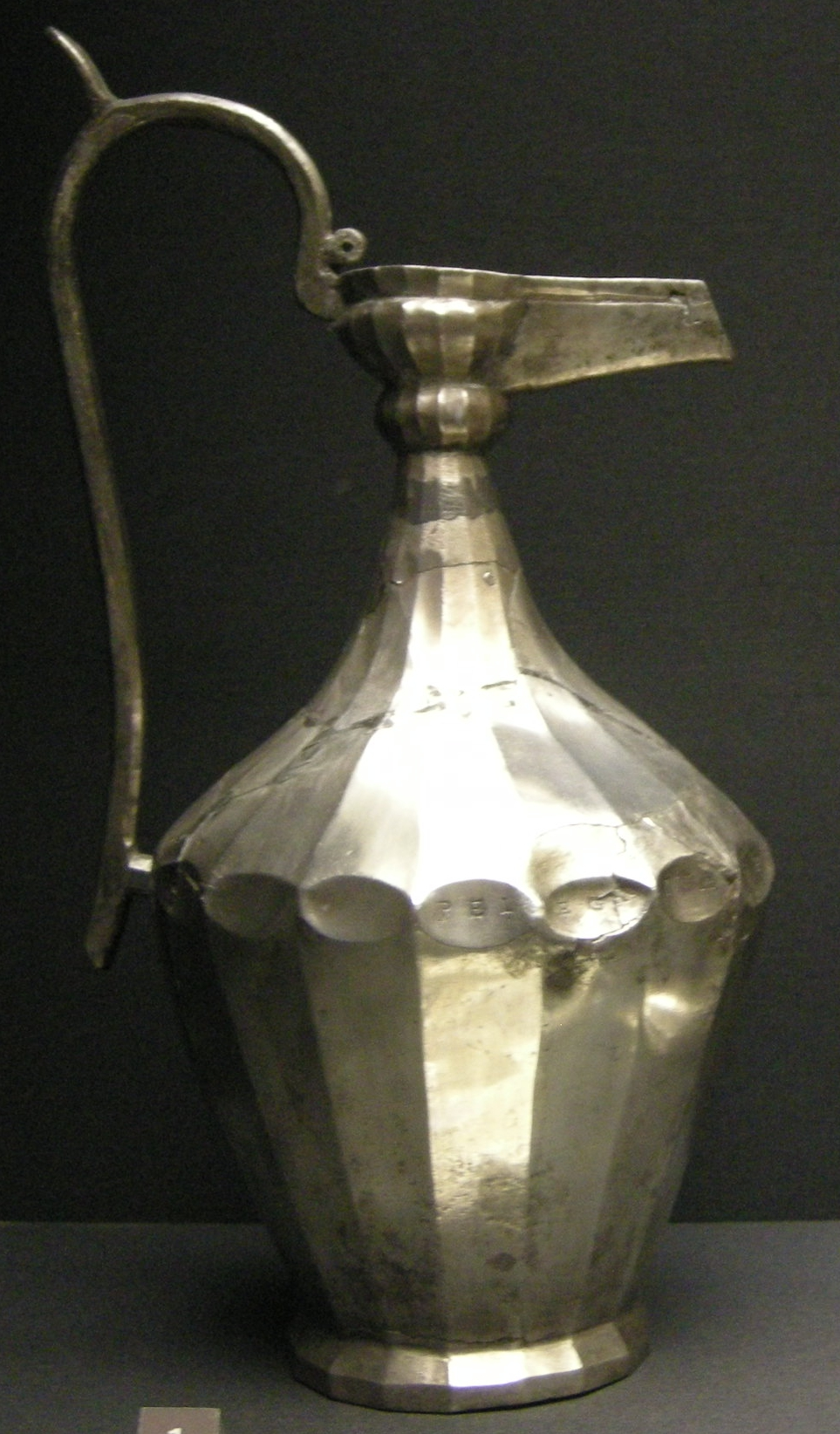 Arte tardoantica da roma, brocca di 'pelegrina' in niello, IV sec